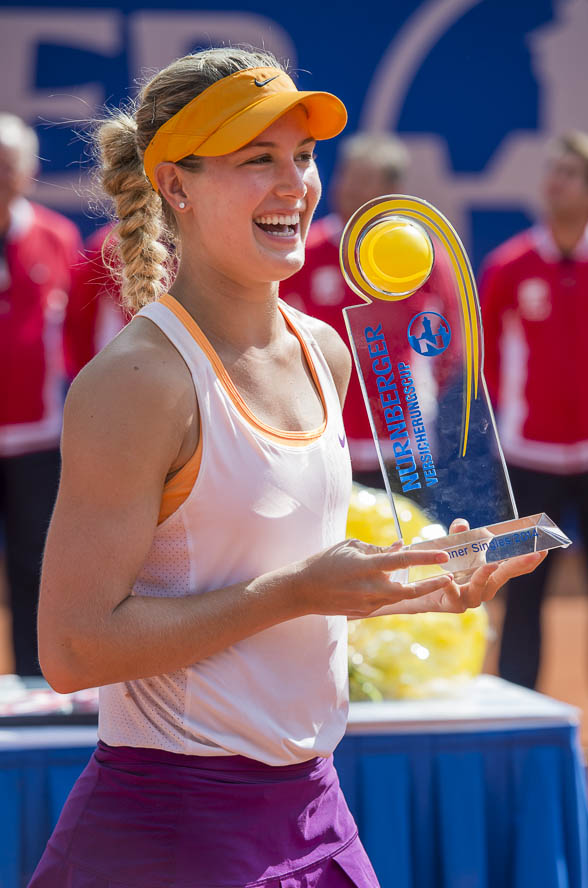 Damentennis,Eugenie Bouchard,Nürnberger Versicherungscup 2014,Tennis,WTA